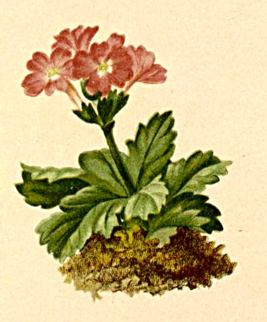 Primula viscosa (Primula latifolia)